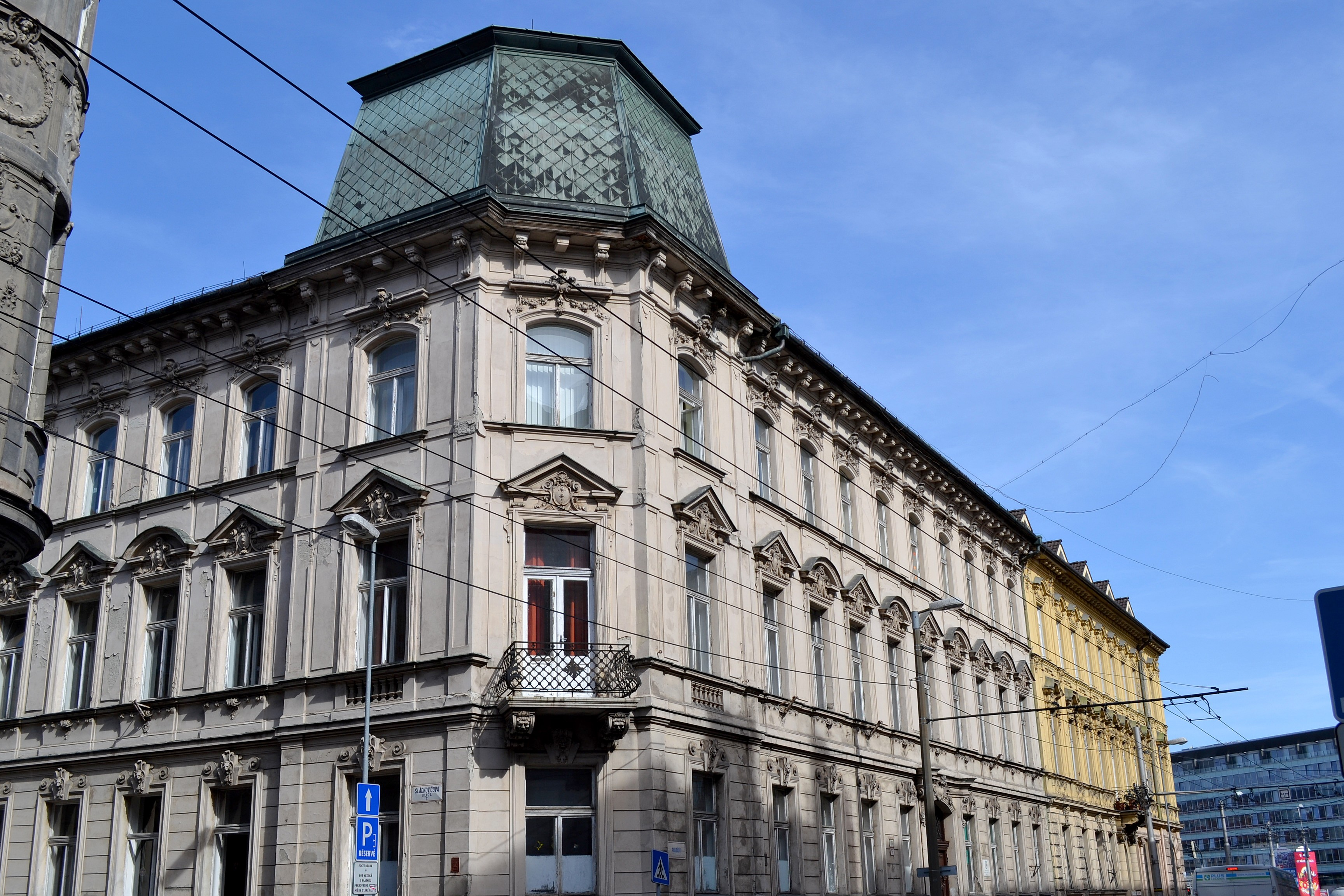 Palisády č. 57. Celkový pohľad na budovu, v ktorej sídli Evanjelická základná škola a lýceum